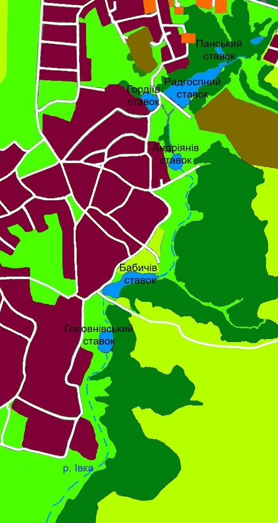 Річки, ставки, яри